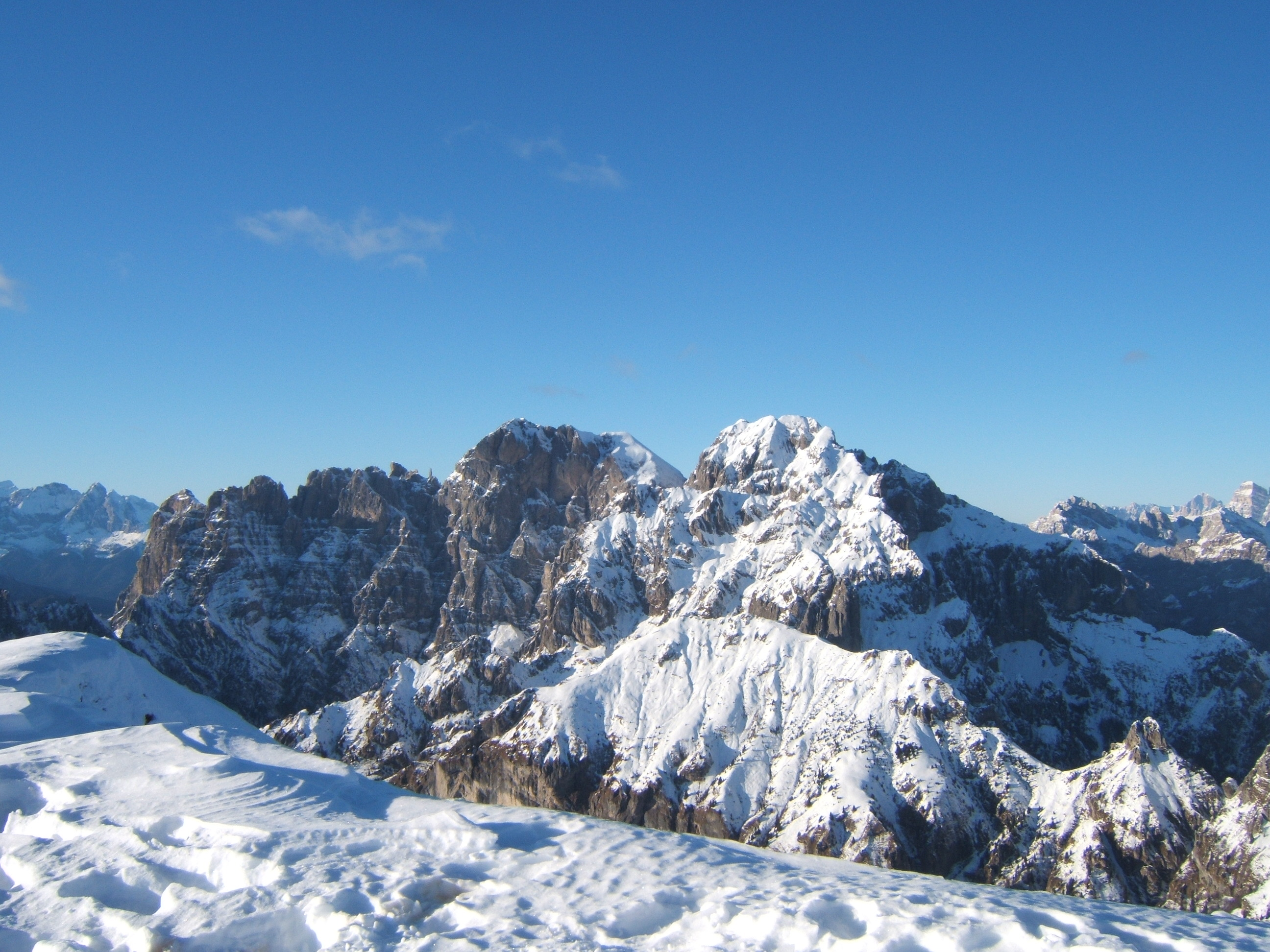 Veduta del gruppo dello Schiara dal monte Serva. Foto scattata da Armadoria